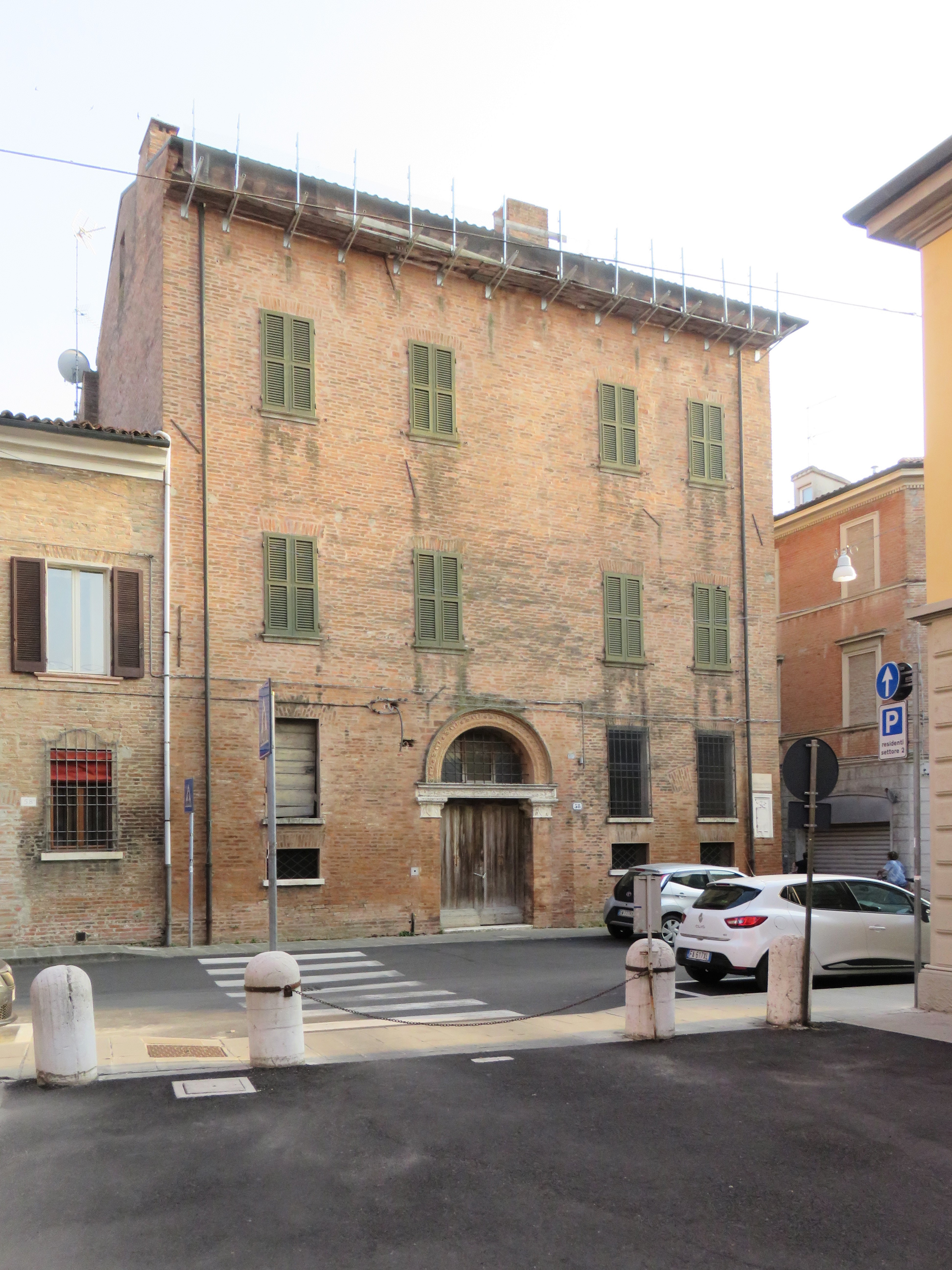 Casa Novelli (che fu Casa Guglielmini, poi Casa Ferretti infine Casa Novi) è un palazzo rinascimentale che si trova nel nucleo medievale di Ferrara, in via Borgo di Sotto